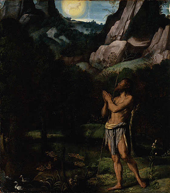 Moretto, battista nel deserto